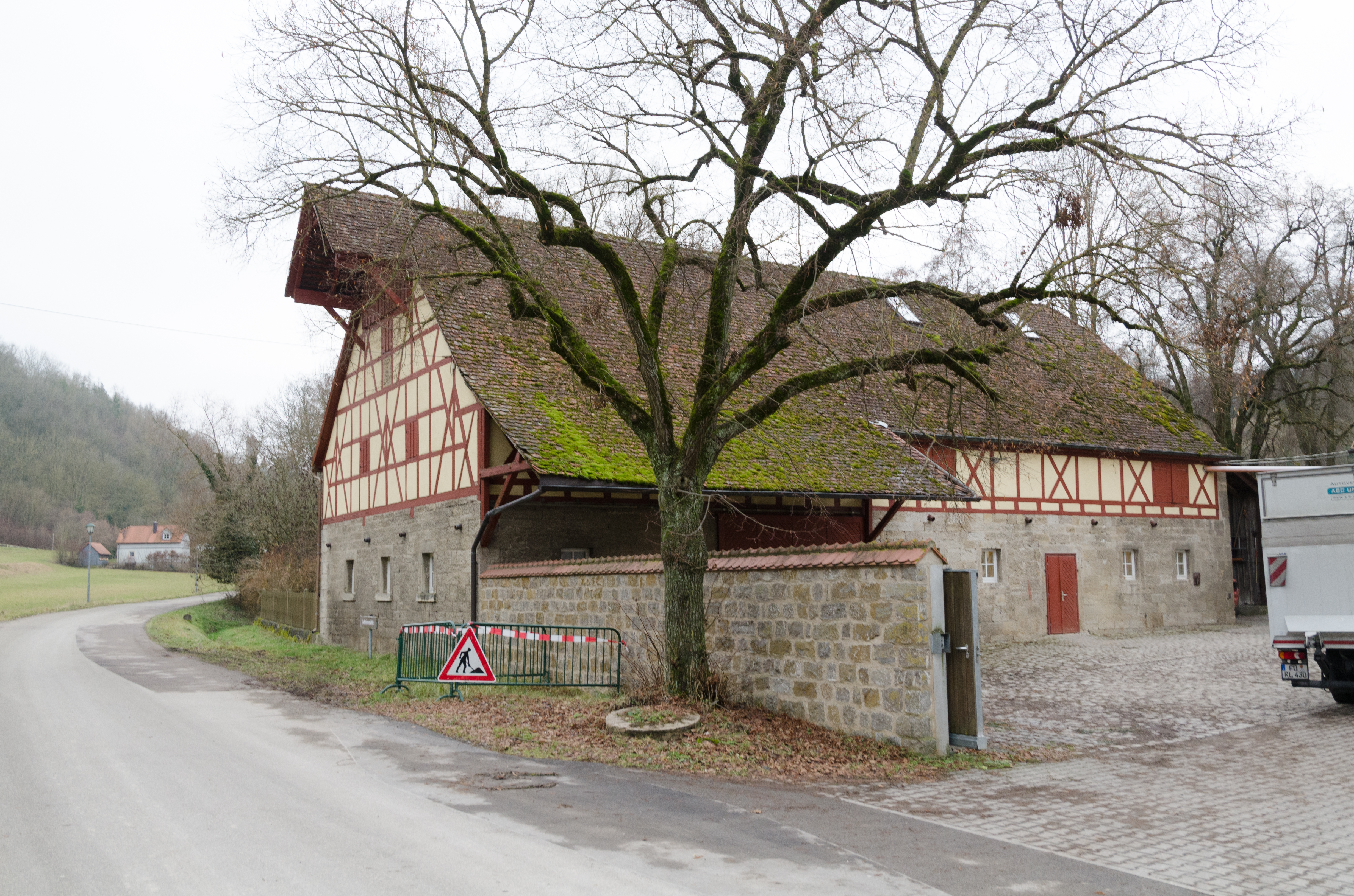 Rothenburg ob der Tauber, Kurze Steig 14, Wirtschaftsgebäude